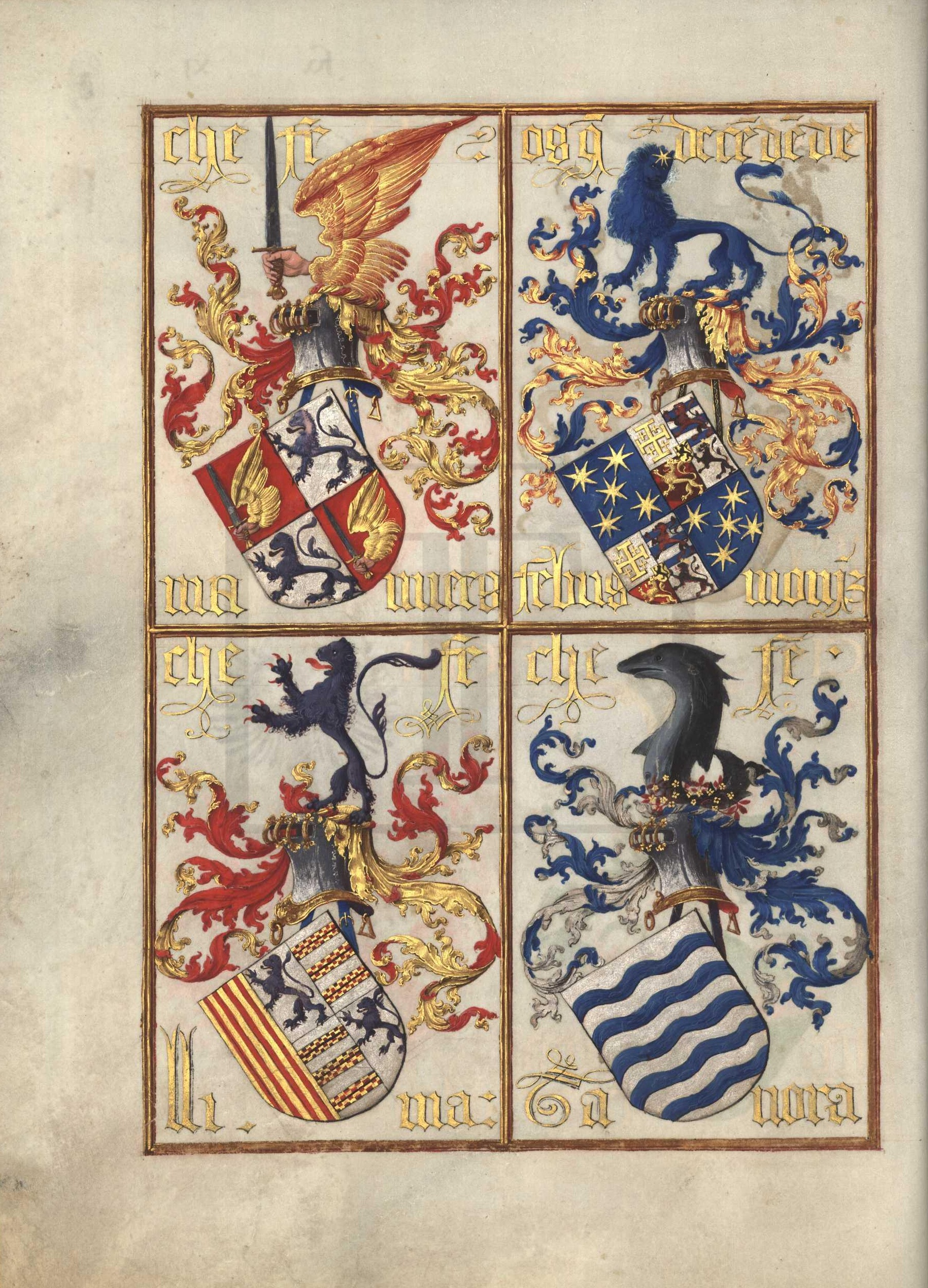 Livro da Nobreza e Perfeiçam das Armas (fl 11v)